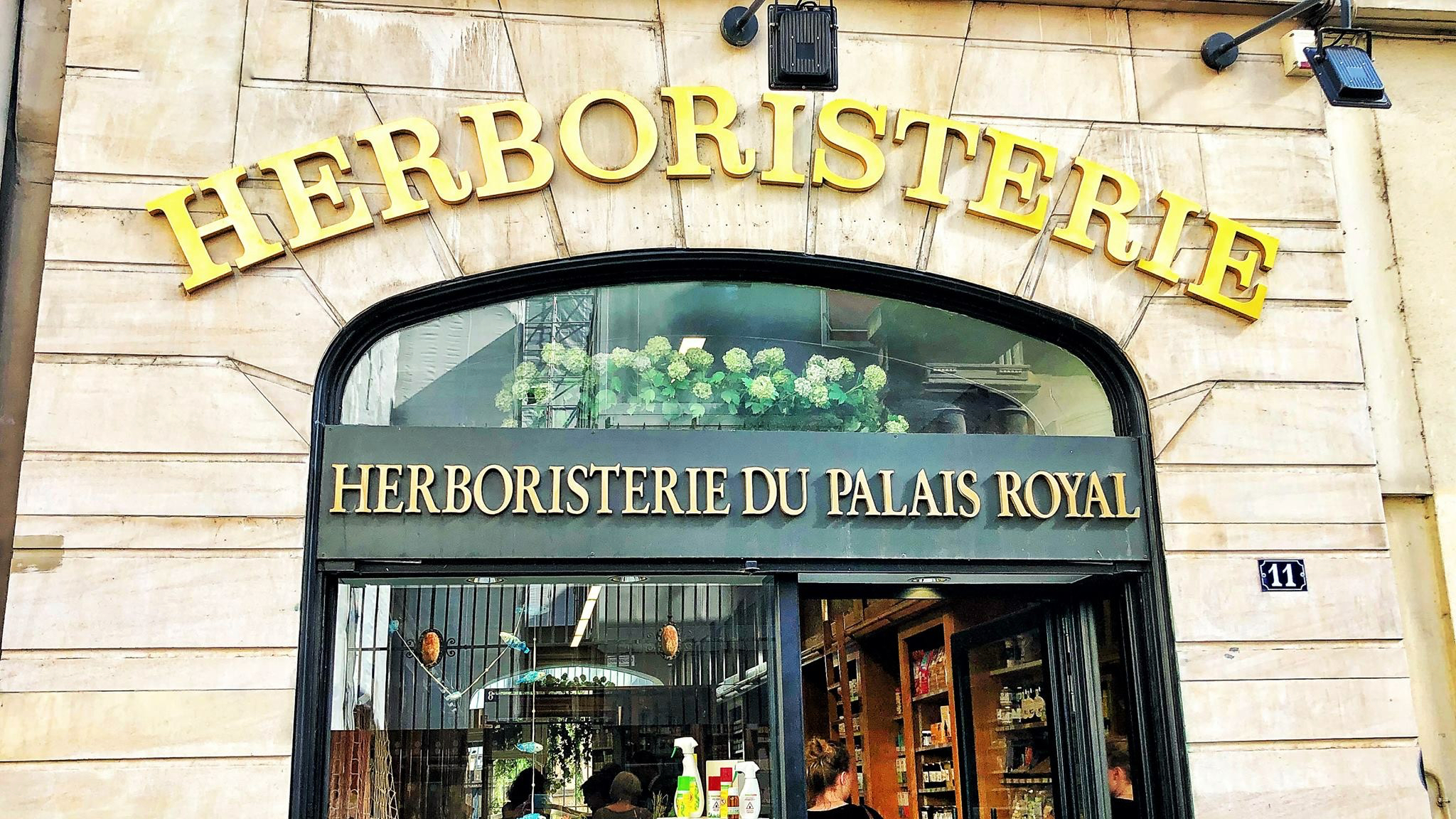 Herboristerie du Palais-Royal - Michel Pierre au 11 rue des Petits Champs Paris 1er